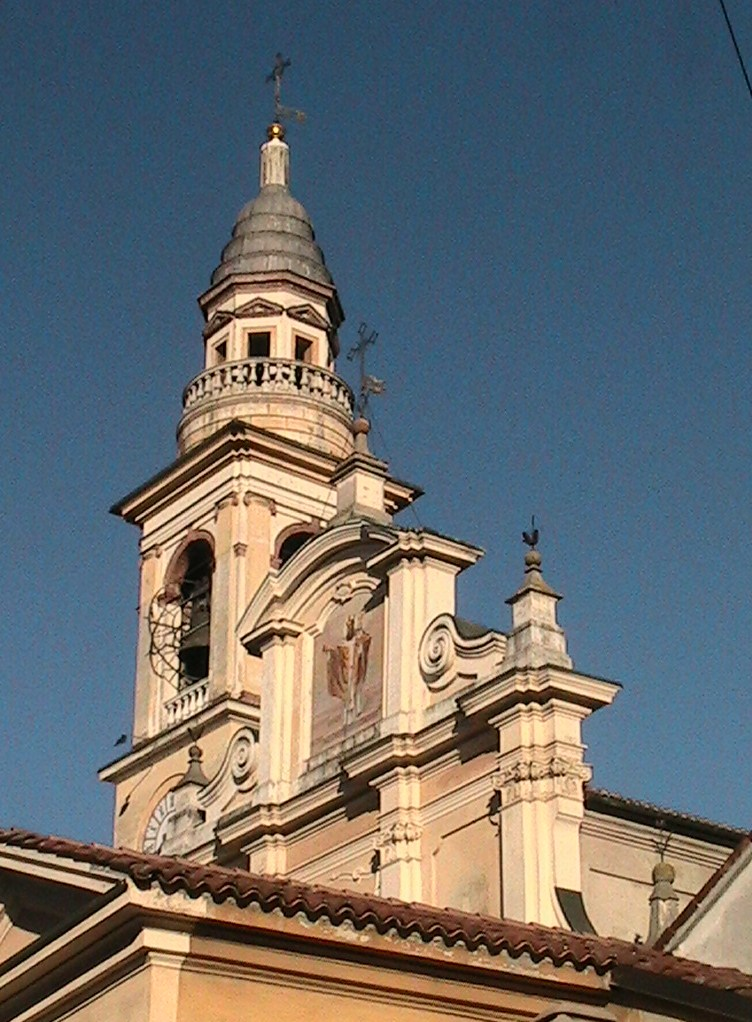 Rivarolo del Re - Campanile e timpano della chiesa di San Zenone